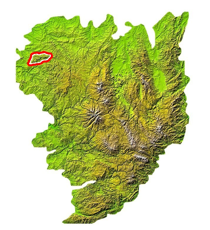 Situation des Monts d'ambazac sur la carte du Massif central